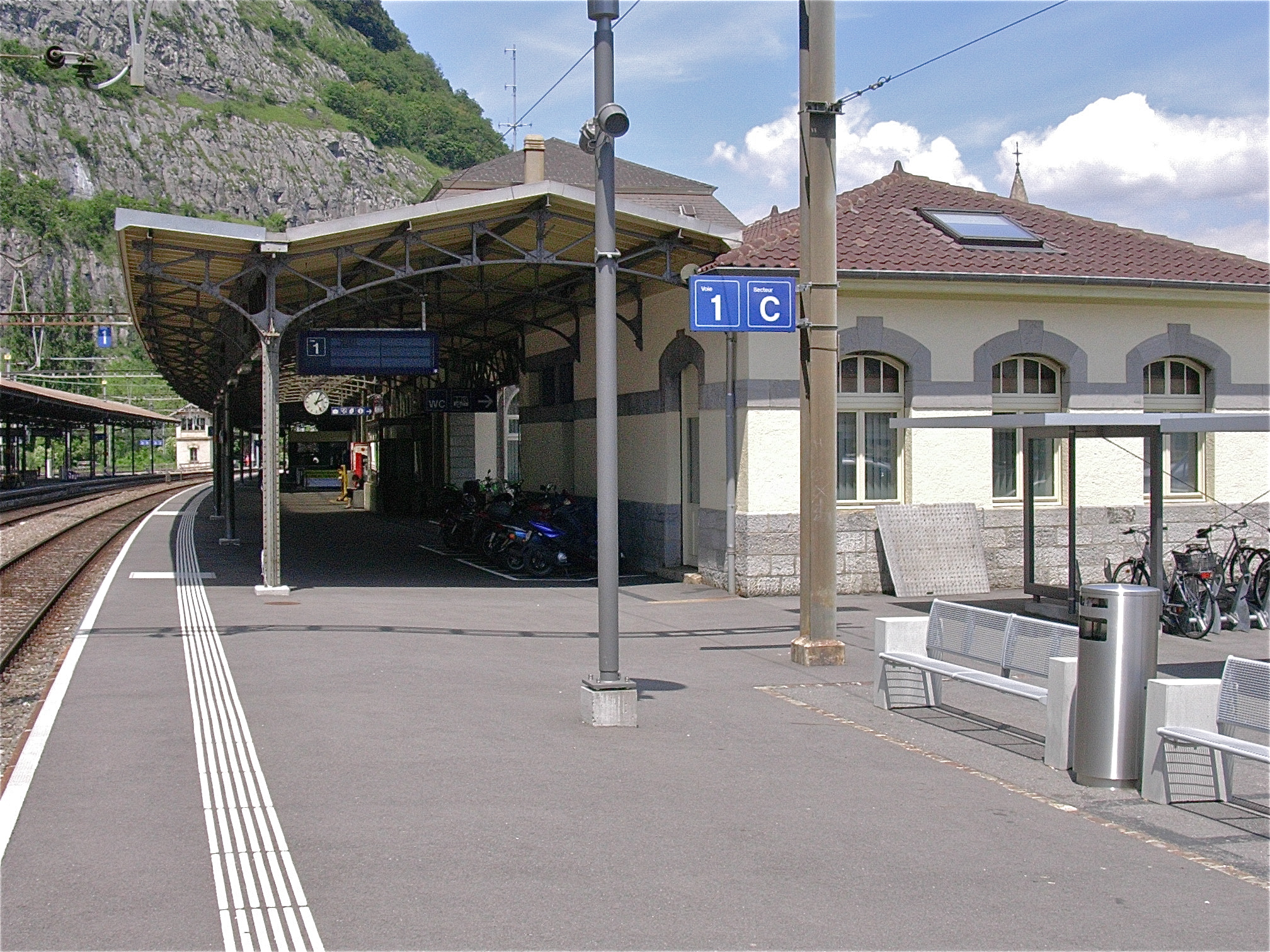 Le quai 1 de la gare de St-Maurice (Valais)